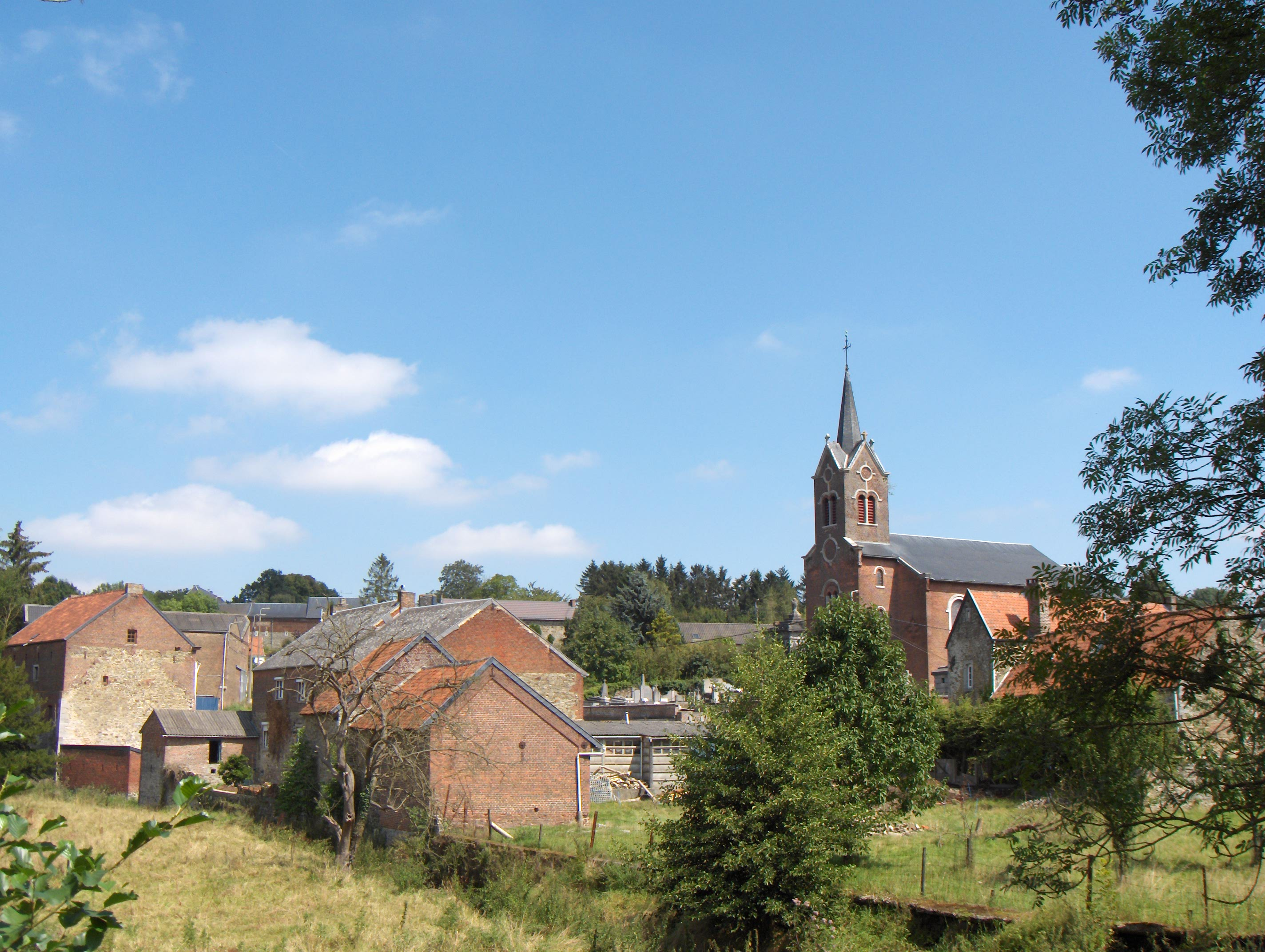 Fallais (Ortsteil der Gemeinde Braives, Belgien, Prov. Lüttich), Dorf im Mehaignetal, Blick von der alten Eisenbahntrasse südwestlich des Dorfes.